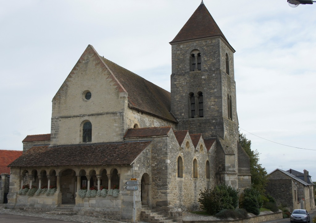 vue du portail ouest de l'église Notre-Dame-et-Saint-Nicaise de Cauroy-lès-Hermonville.